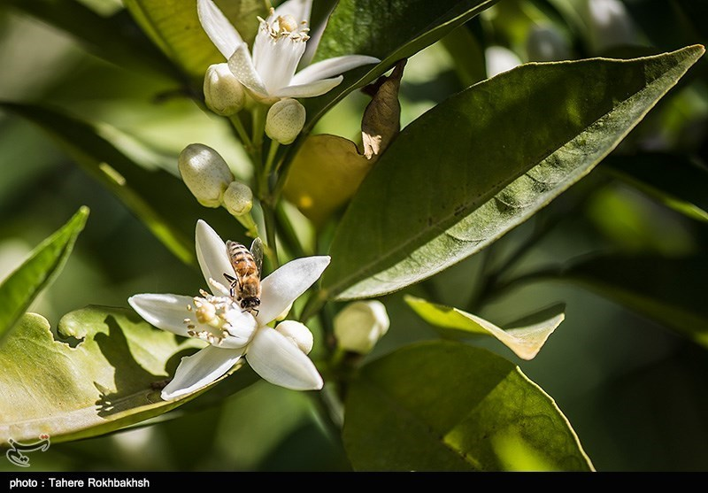 بهار نارنج، شکوفه درخت نارنج است که در عطرسازی و ساختن اسانس ، انواع نوشیدنی‌های فصلی و عرقیجات و تهیه مربا، گز ، سوهان و ... کاربرد بسیار دارد.شیراز در اردیبهشت ماه ، با رایجه ی سحرانگیز بهار نارنج ، هر رهگذری را سرمست می‌کند به نحوی که این شهرشیراز را شهرِ بهارنارنج می‌نامند.